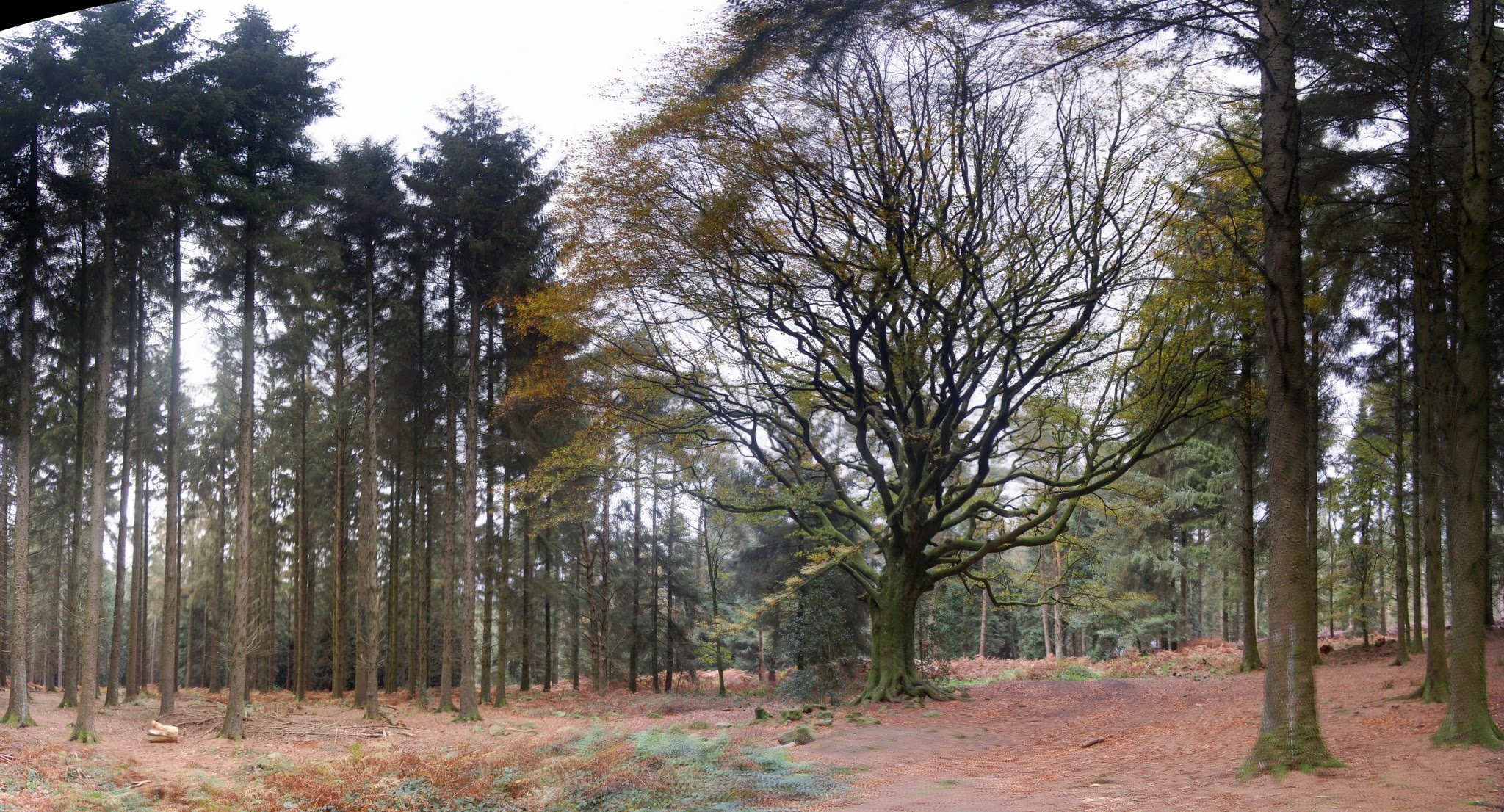 Le hêtre de Ponthus à Folle Pensée à Paimpont